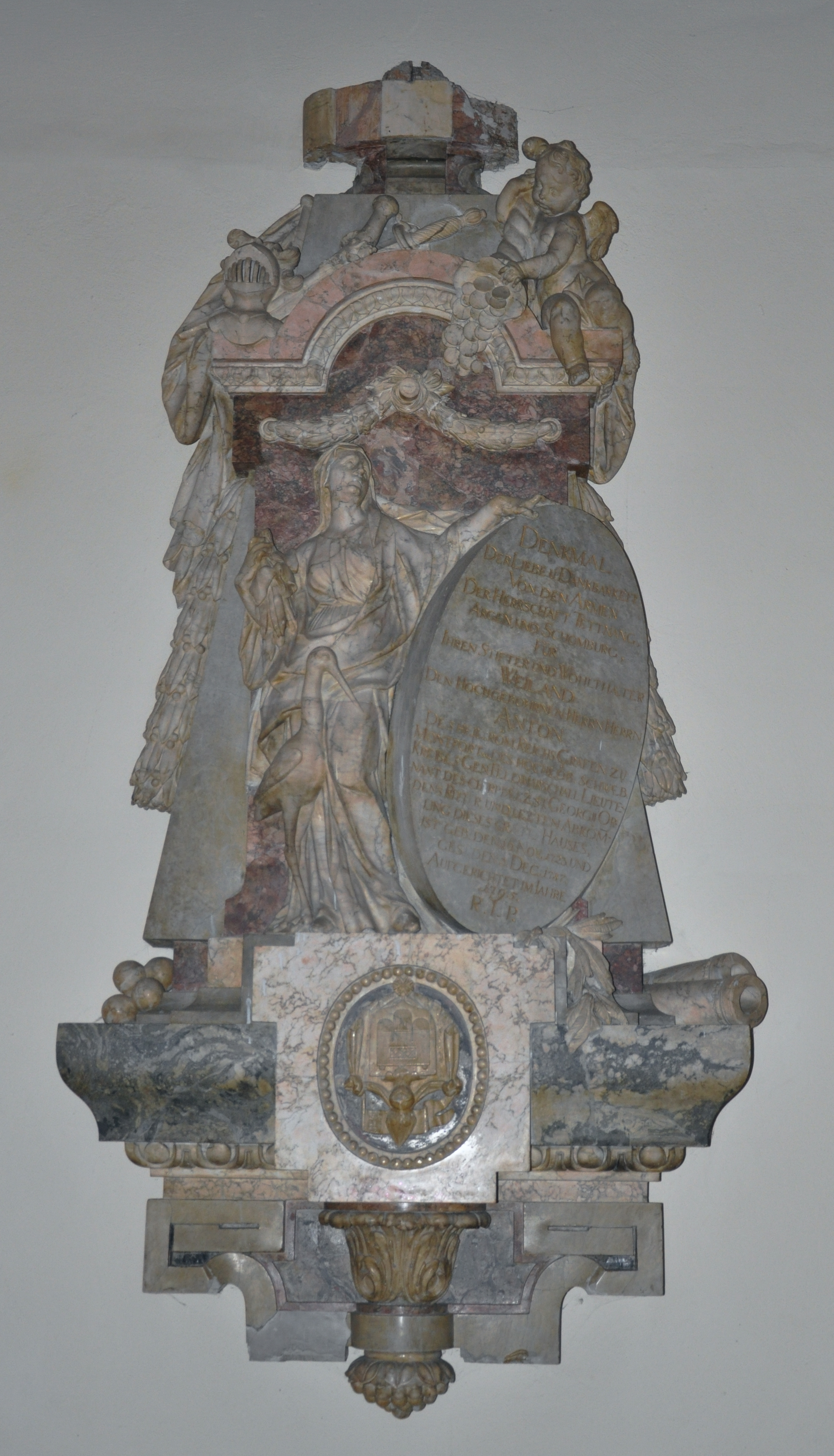 Tettnang, Kath. Pfarrkirche St. Gallus, Montfort-Denkmal in der Vorhalle